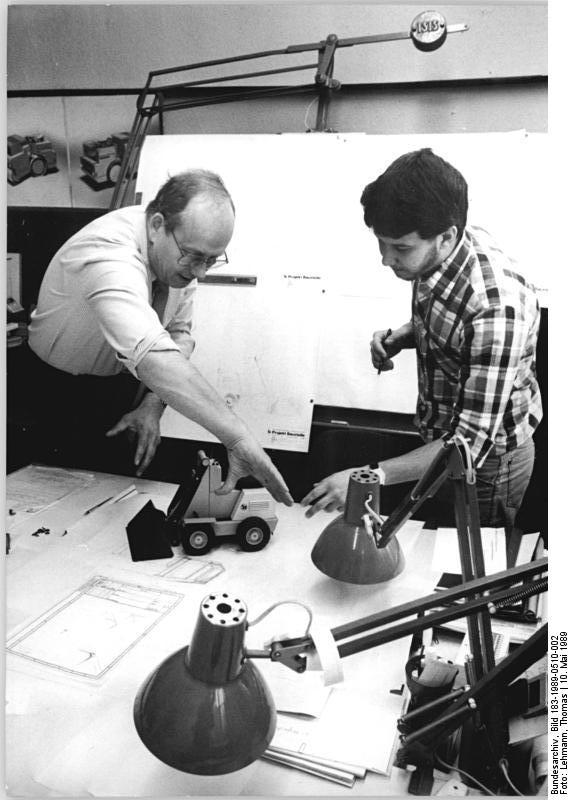 Hall/Saale, kubanischer Gaststudent ADN-ZB Lehmann 10.5.89 Halle: Kooperation - Hector Costa (r), hier mit Professor Dr. Karl-Joachim Heinemann bei einer Modell-Funktionsprüfung, gehört zu den 12 kubanischen Studenten, die an der Hochschule für industrielle Formgestaltung Burg Giebichenstein in Halle zu Industrieform- Metall-, Bildteppich oder Spielzeuggestaltern ausgebildet werden. Für das Kombinat Baukema wurden Klein- Erdbewegungsmaschinen entworfen, die zum Einsatz im stadtwirtschaftlichen Bereich vorgesehen sind. Damit wird eine vor zehn Jahren begonnene Kooperation, die heute von der studentischen Ausbildung, über Lehrkräfteaustausch bis hin zur planmäßigen Zusammenarbeit mit der Partnereinrichtung in Havanna reicht, erfolgreich fortgesetzt.